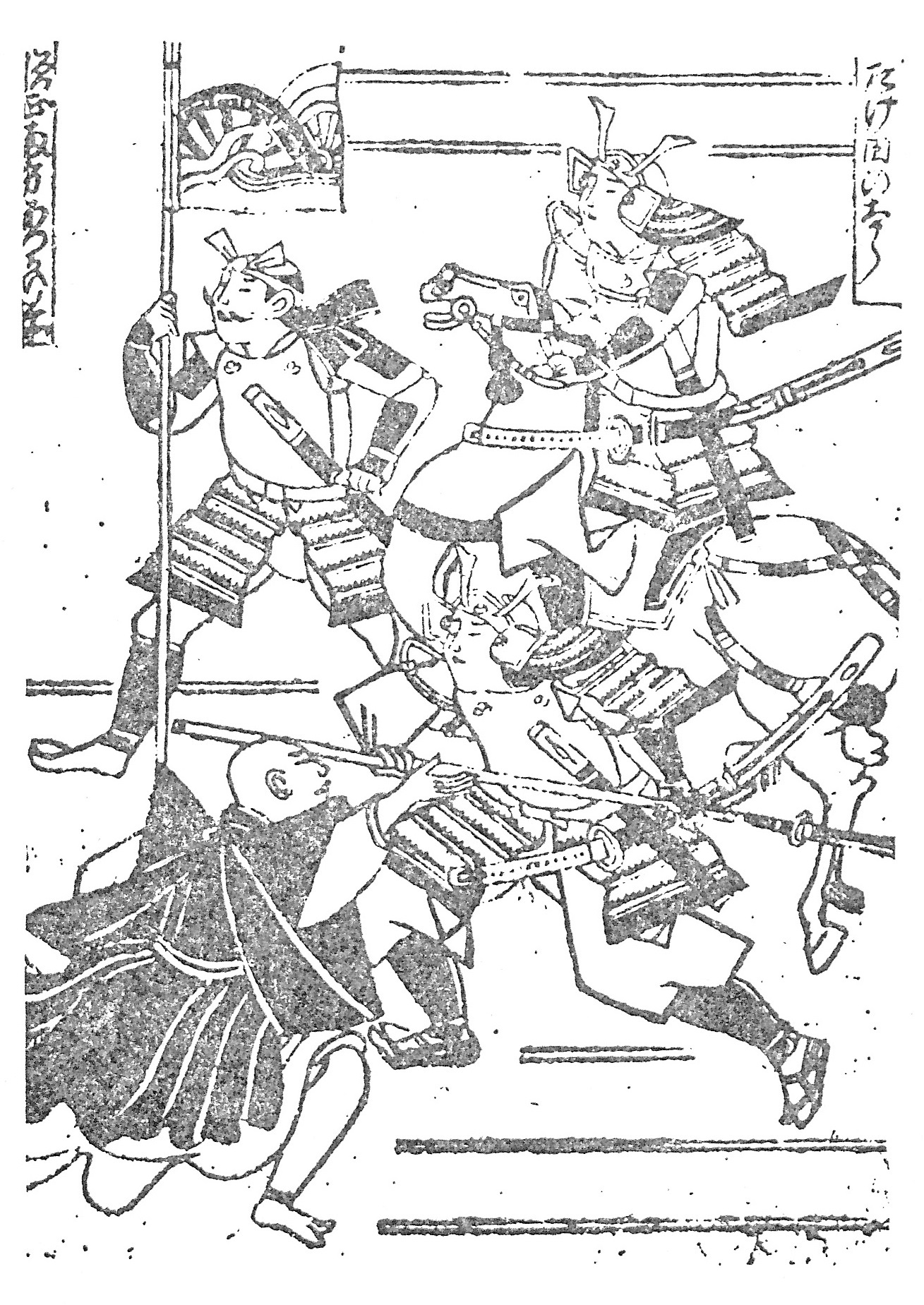 説経節『愛護若』（1670年）